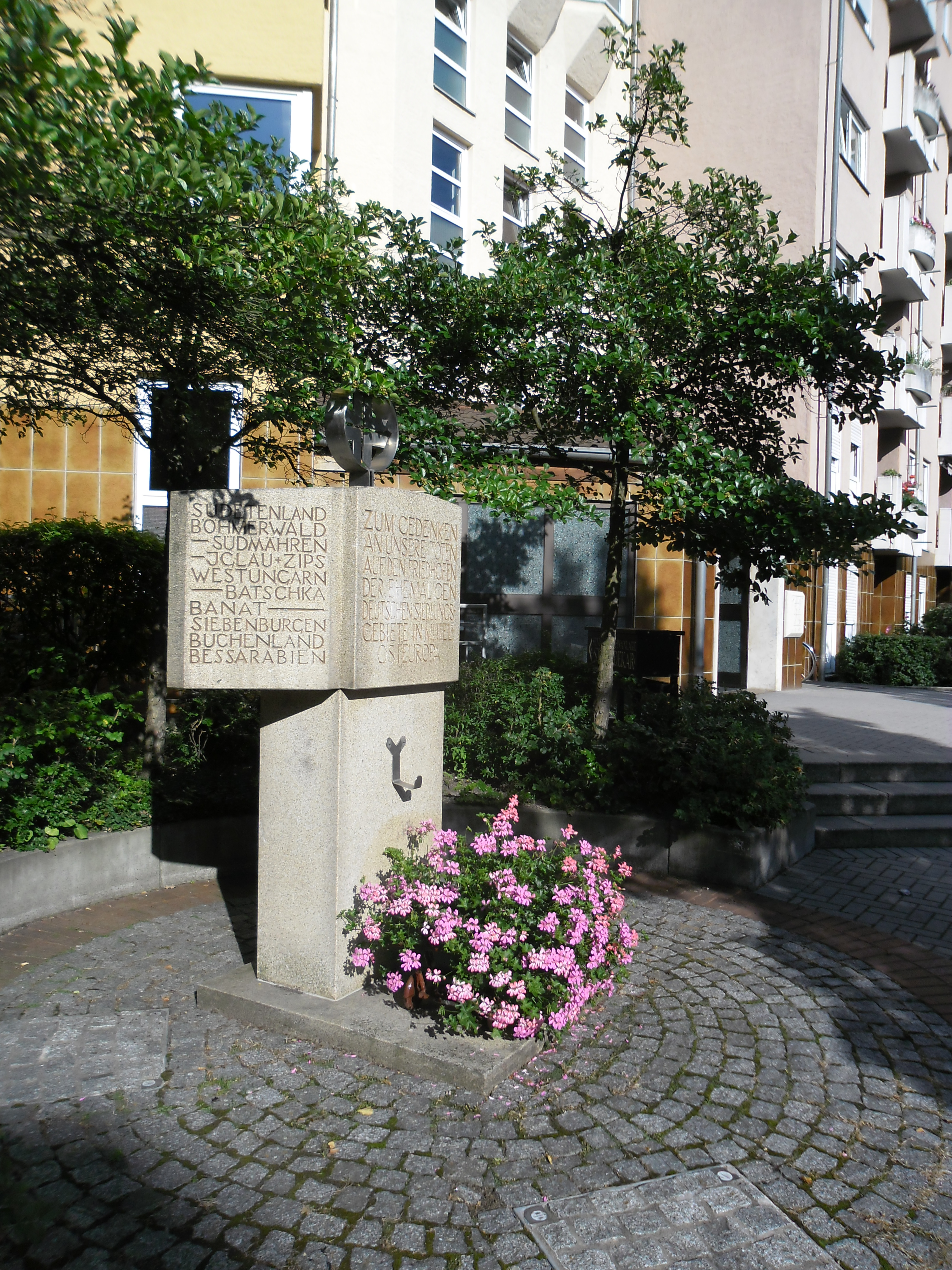 Gedenkstein für auf Friedhöfen im Sudetenland, Böhmerwald, in Südmähren, Iglau, Zips, Westungarn, in der Batschka, im Banat, in Siebenbürgen, im Buchenland und in Bessarabien bestatteten Volksdeutschen im Zuckmayerweg in Nürnberg-Langwasser